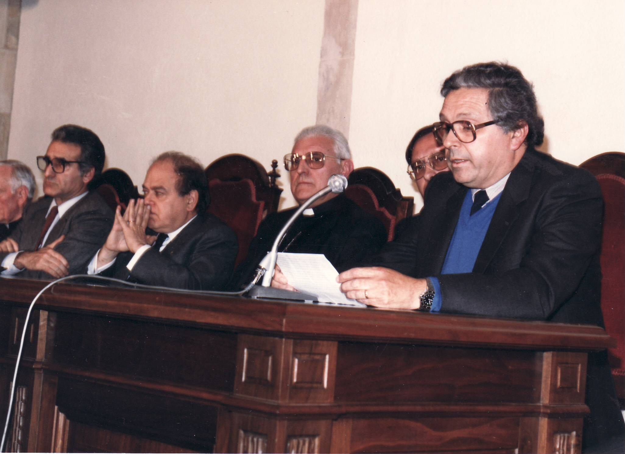 Josep Tremoleda durant la cel.lebració del 25è aniversari de Cavall Fort